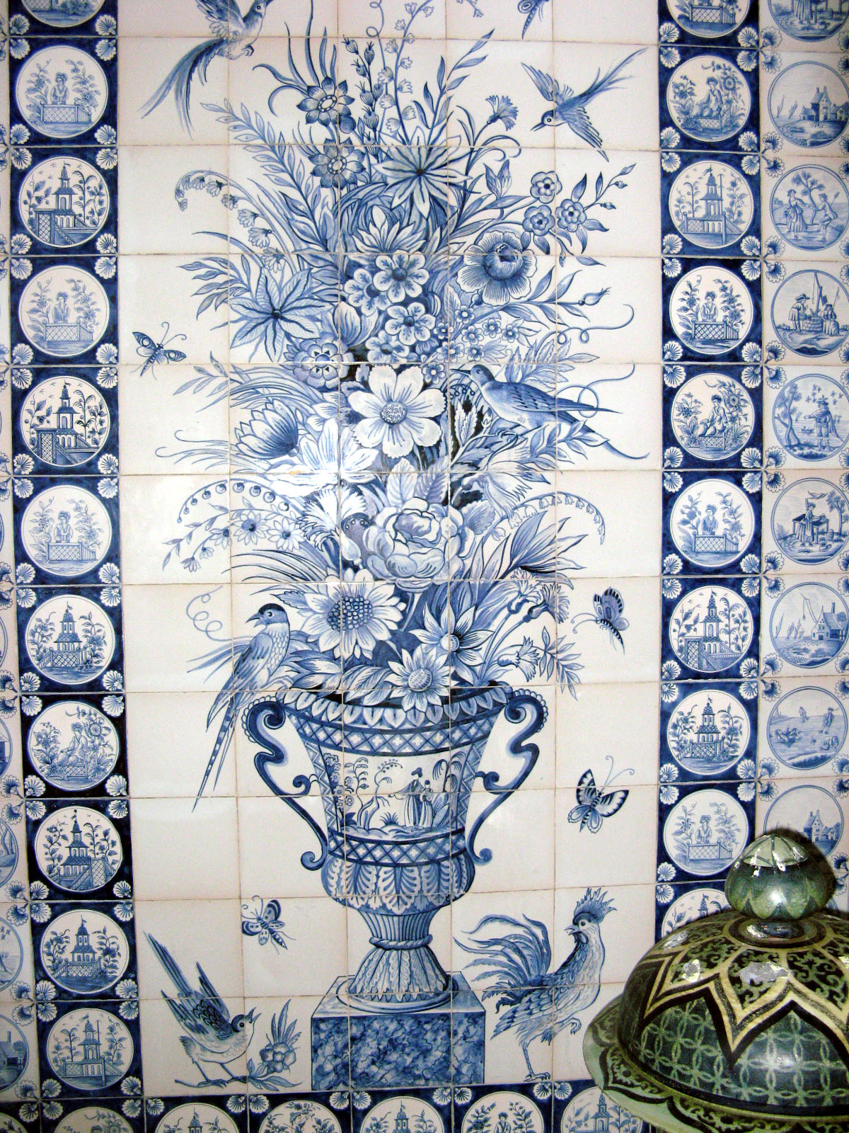 Château de Grousay : Tente tatare, carreaux de Delft